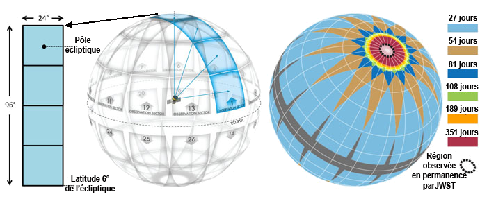 Régions de l'espace observée par le télescope TESS et durée de ces observations